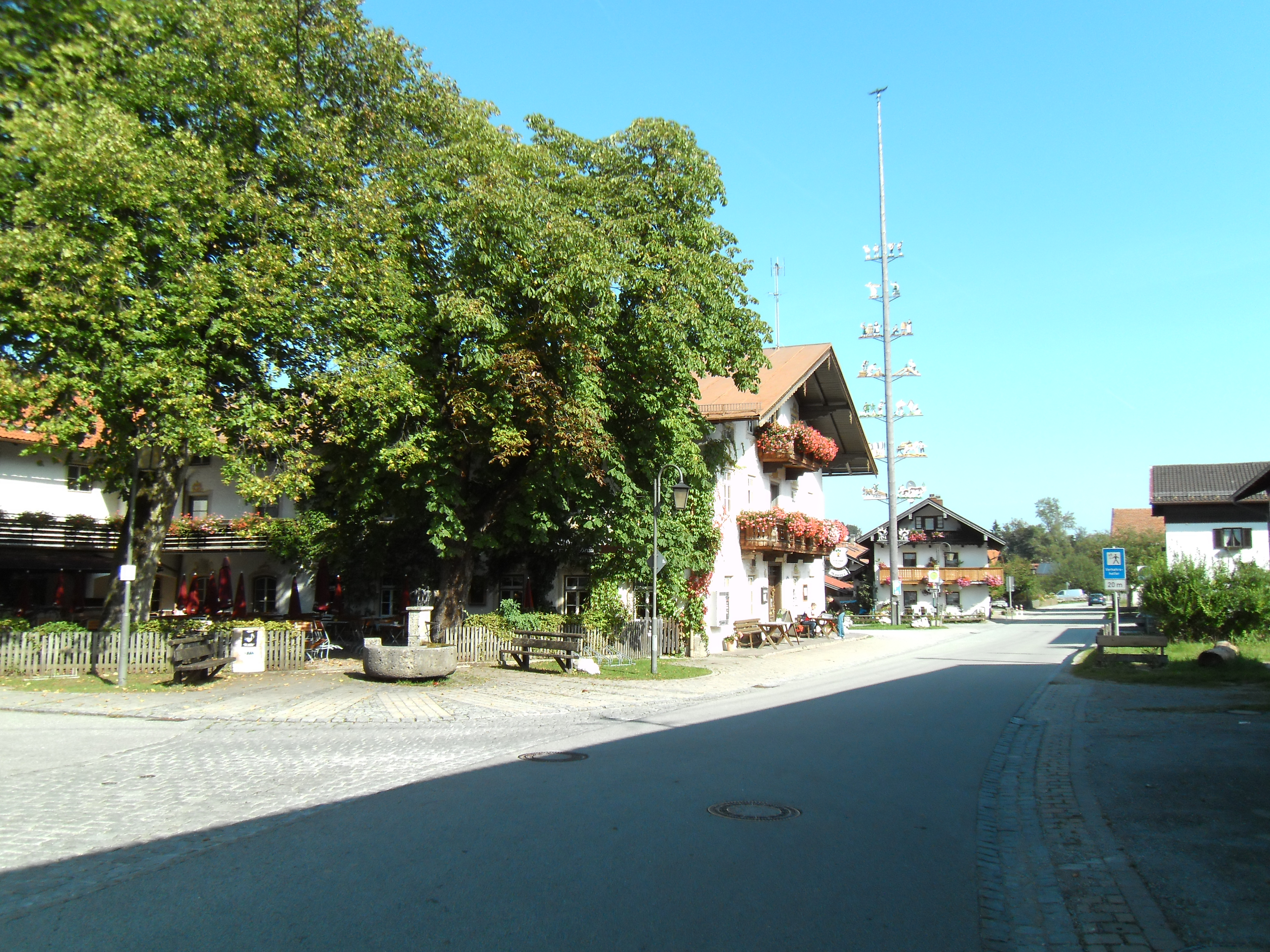 Gemeinde Samerberg im Landkreis Rosenheim, Oberbayern. Das Bild zeigt die Dorfstraße von Grainbach mit der raditionsgaststätte Maurer (links im Bild, links daneben der schattige Biergarten unter Bäumen, davor der Dorfbrunnen mit zwei Sitzbänken).